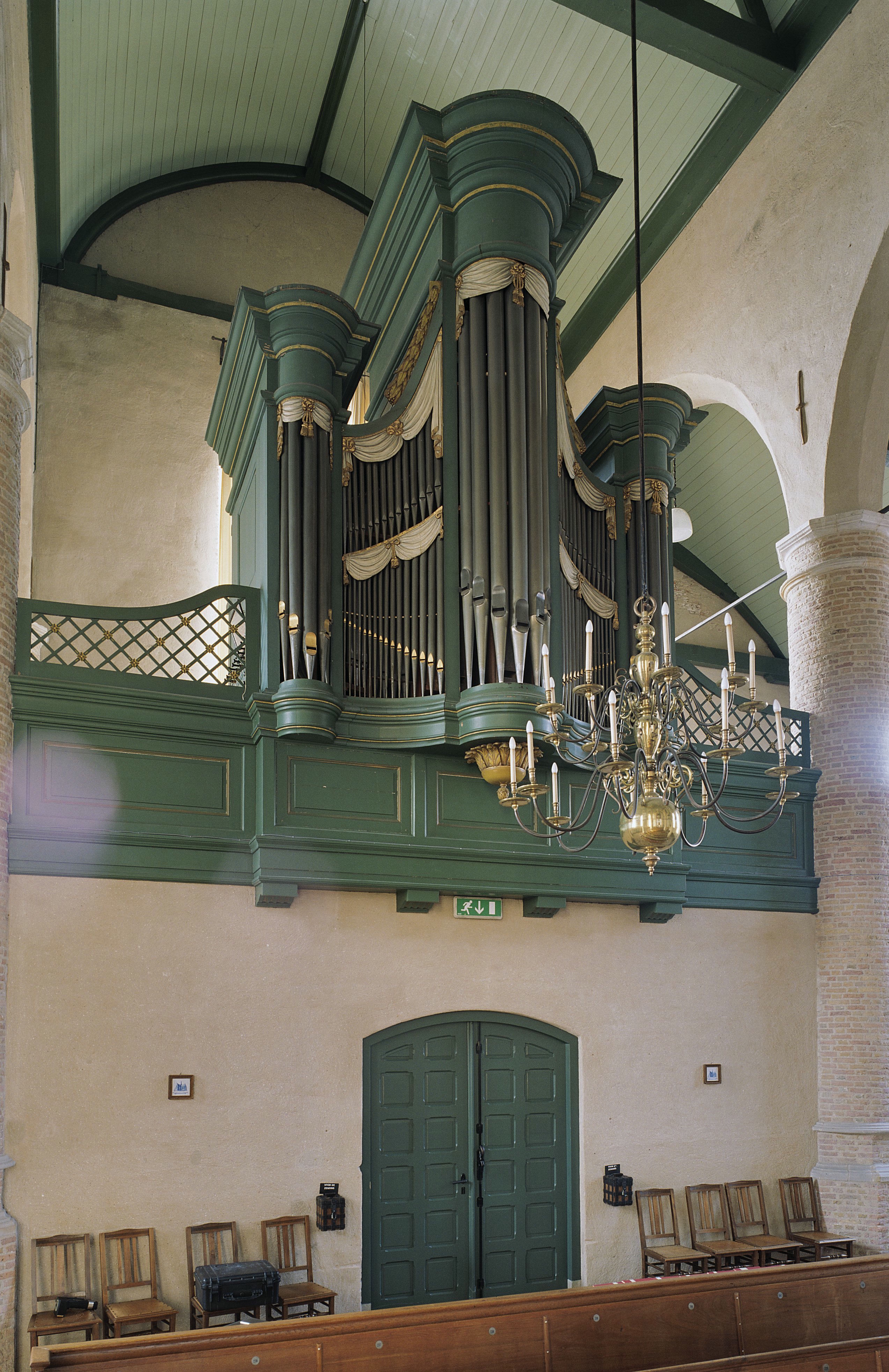 Nederlands Hervormde Kerk: Interieur, aanzicht orgel, orgelnummer 1590 (opmerking: Gefotografeerd voor Het Historische Orgel in Nederland 1819-1840, bladzijde 127)